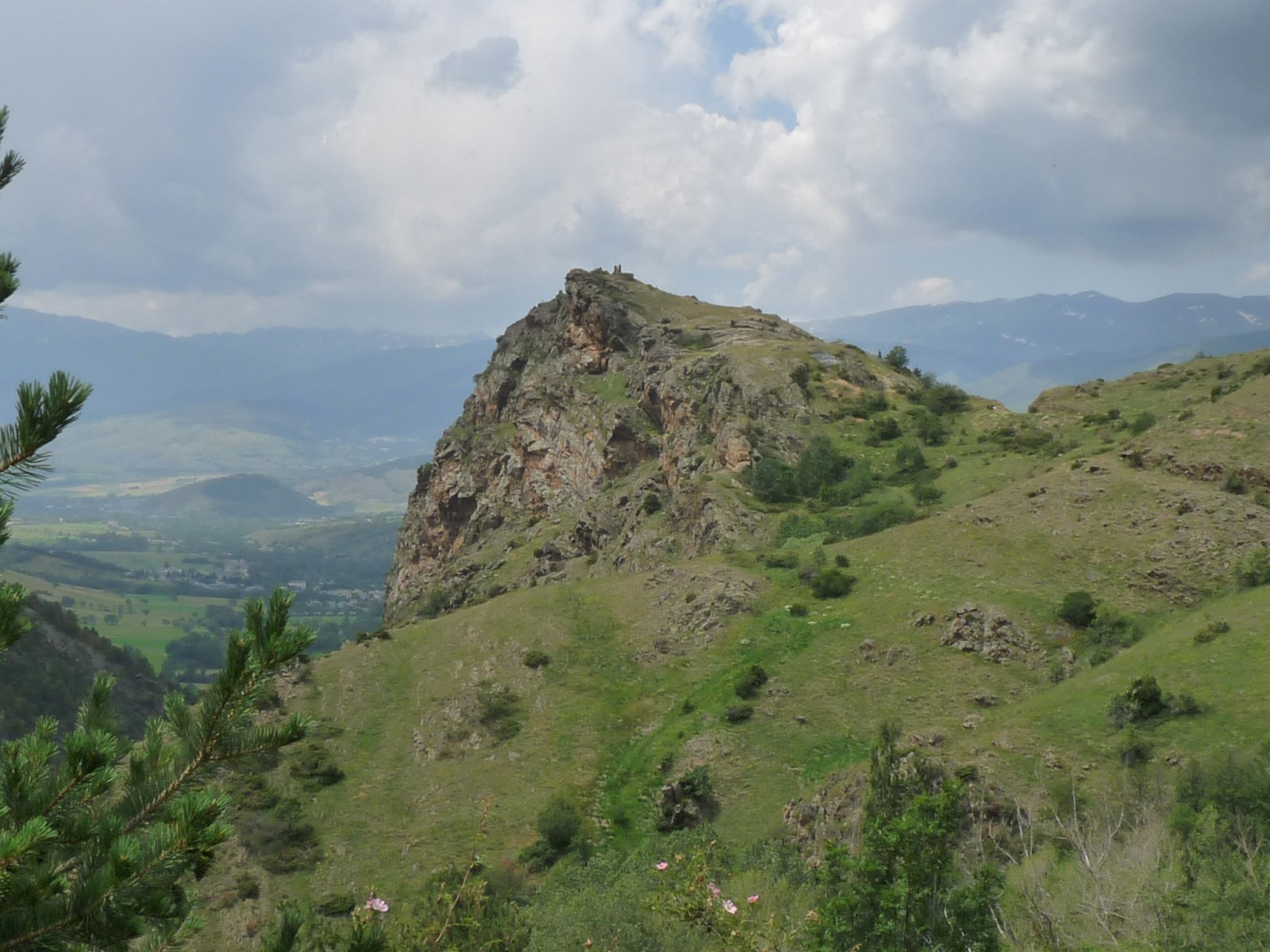 Chapelle St-Félix du Château, Llo, Pyrénées-Orientales, France